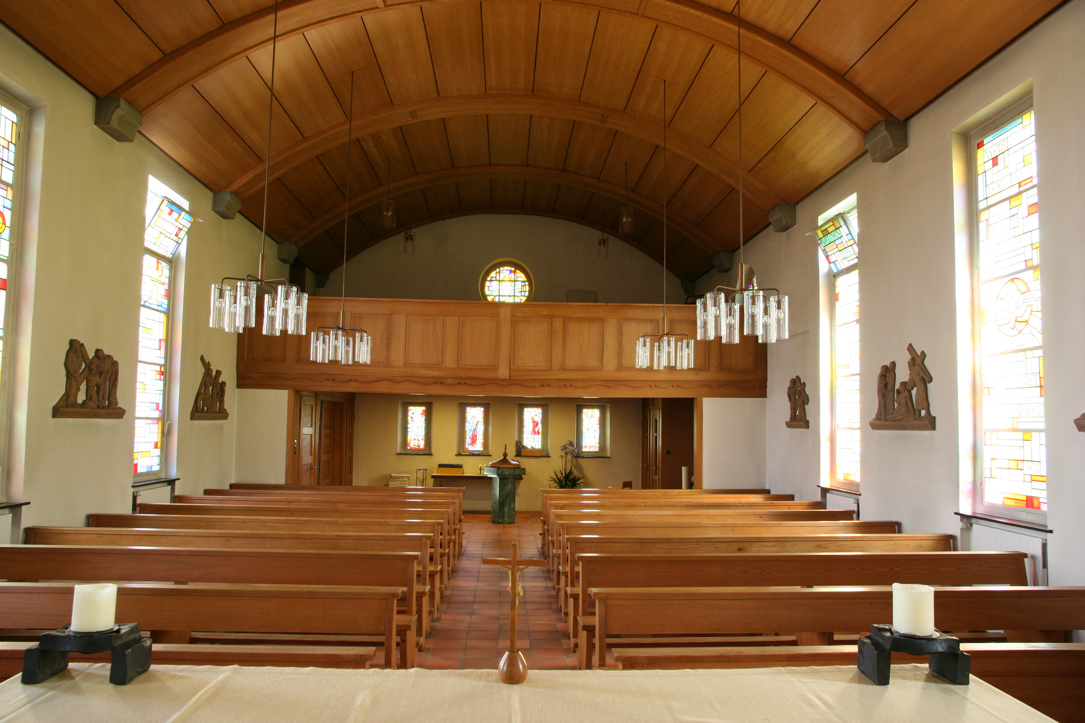 Römisch-katholische Kirche Liebfrauen Oberstammheim, Blick zur Empore